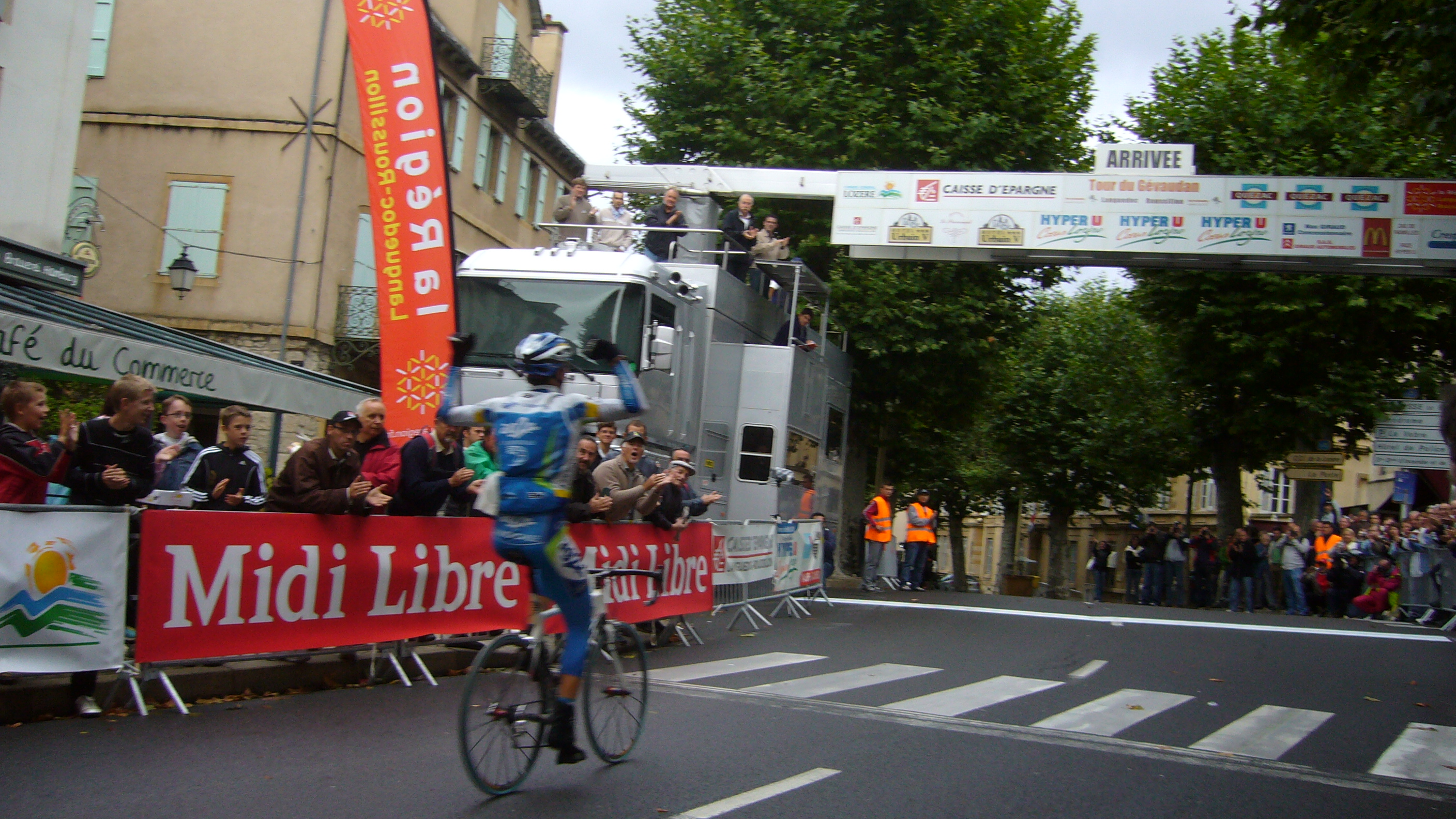 L'arrivée de Julien Bérard lors de la 2e étape du Tour du Gévaudan 2008